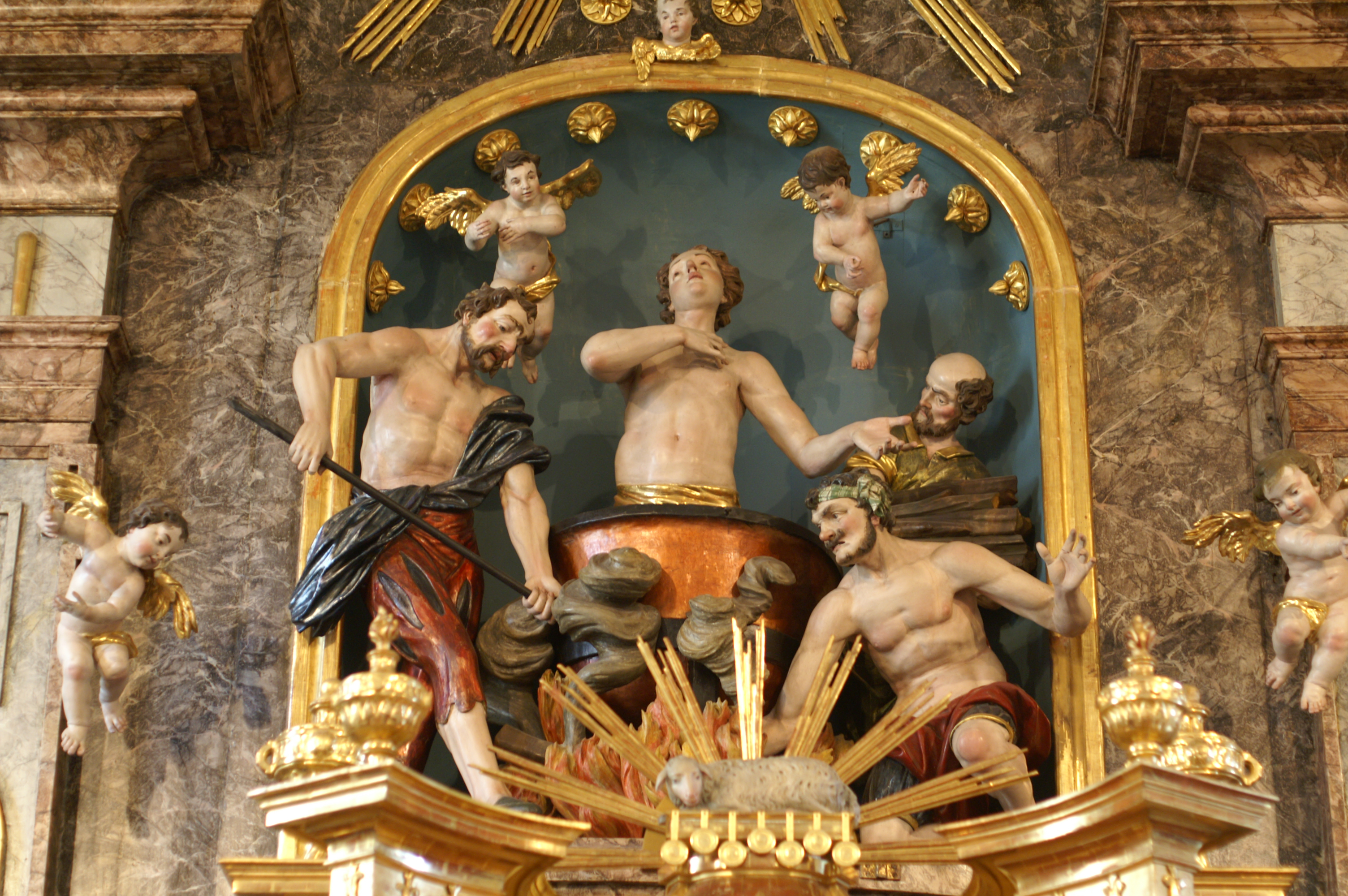 Kath. Pfarrkirche, Kirchhof/Friedhof ehemaliger, Kath. Pfarrkirche hl. Veit und ehem. Friedhof